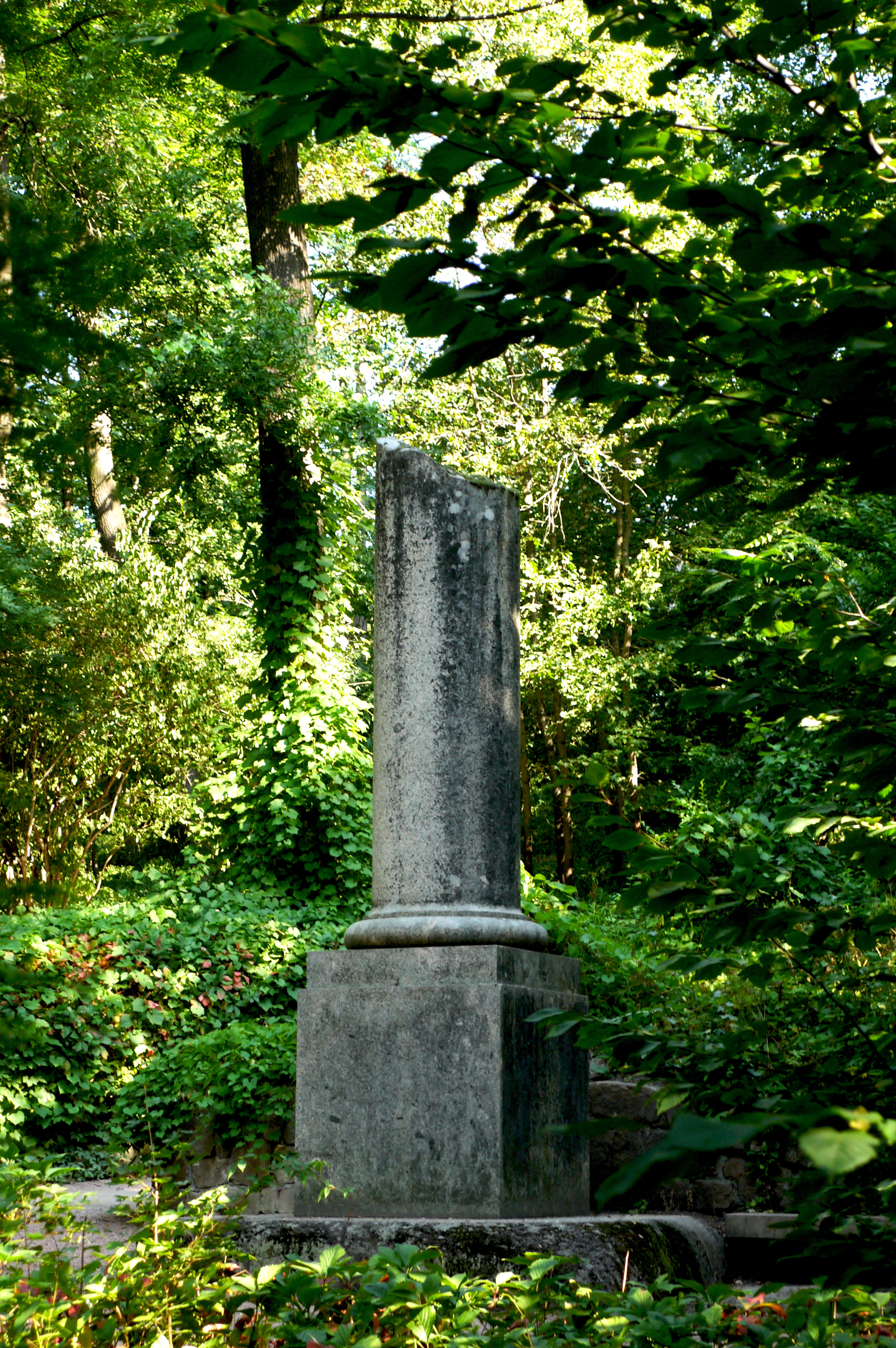 4.10. Зрізана (Усічена) колона або Колона Суму (мур.), Умань, вул. Садова, 55 (парк «Софіївка»)